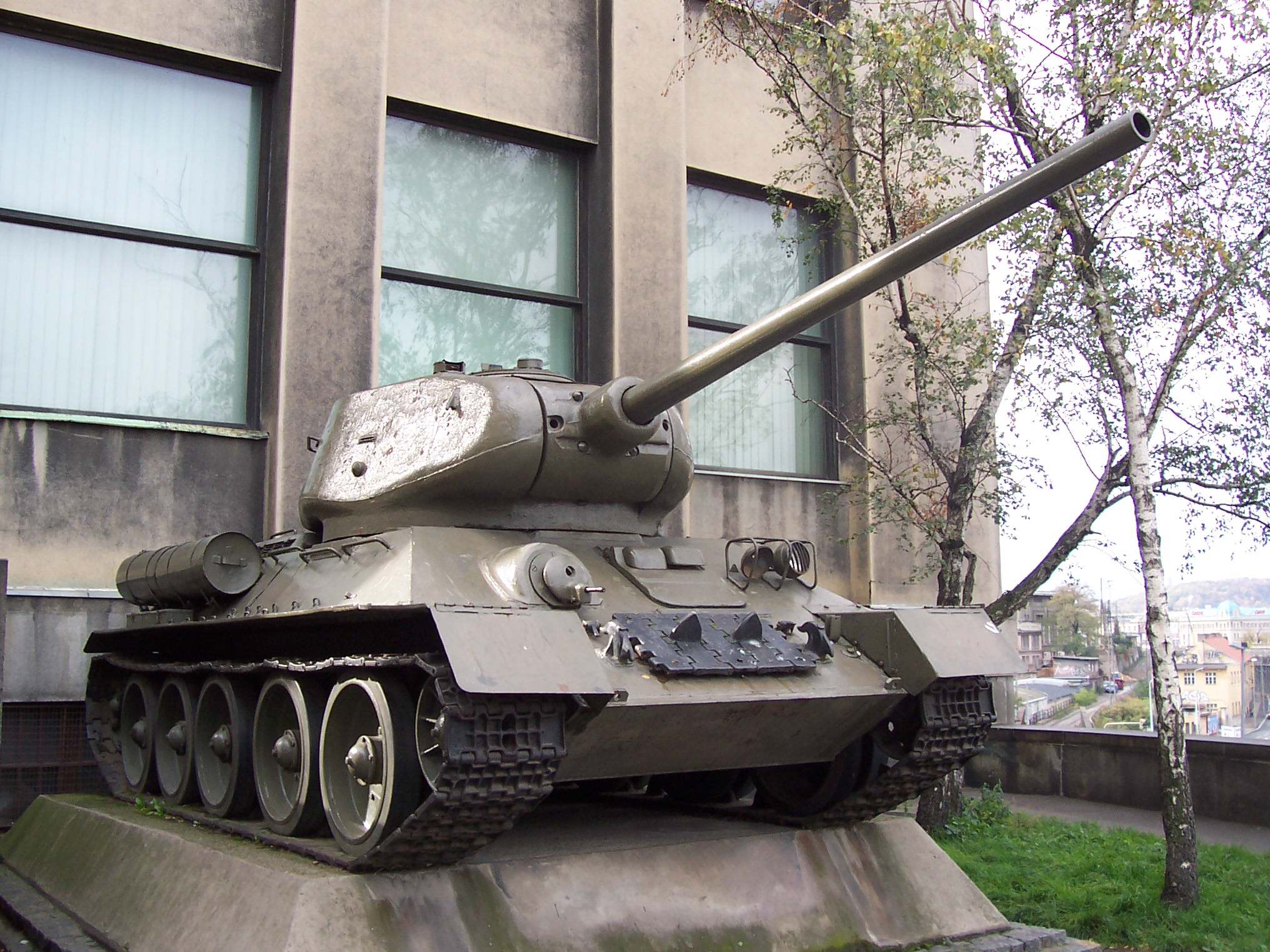 Česky: Tank před muzeem (Armádní muzeum Žižkov) v Praze na Vítkově. Muzeum spadá pod Vojenský historický ústav.